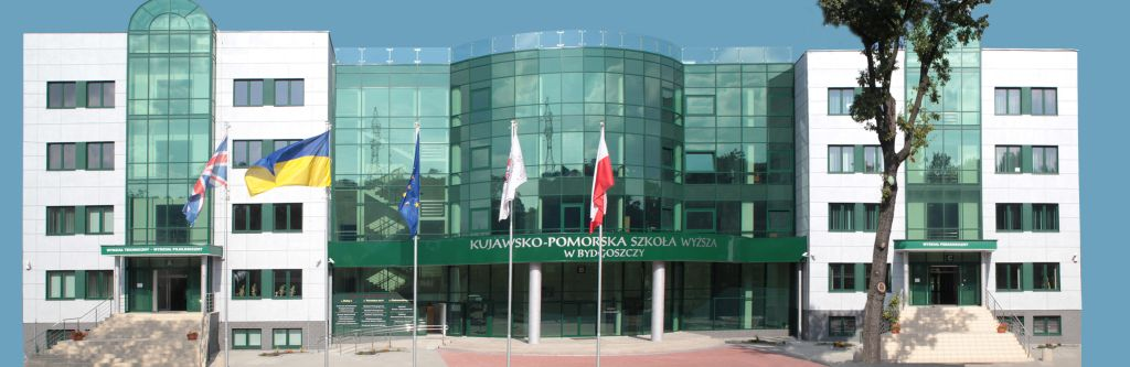 Budynek KPSW przy ul. Toruńskiej 55-57